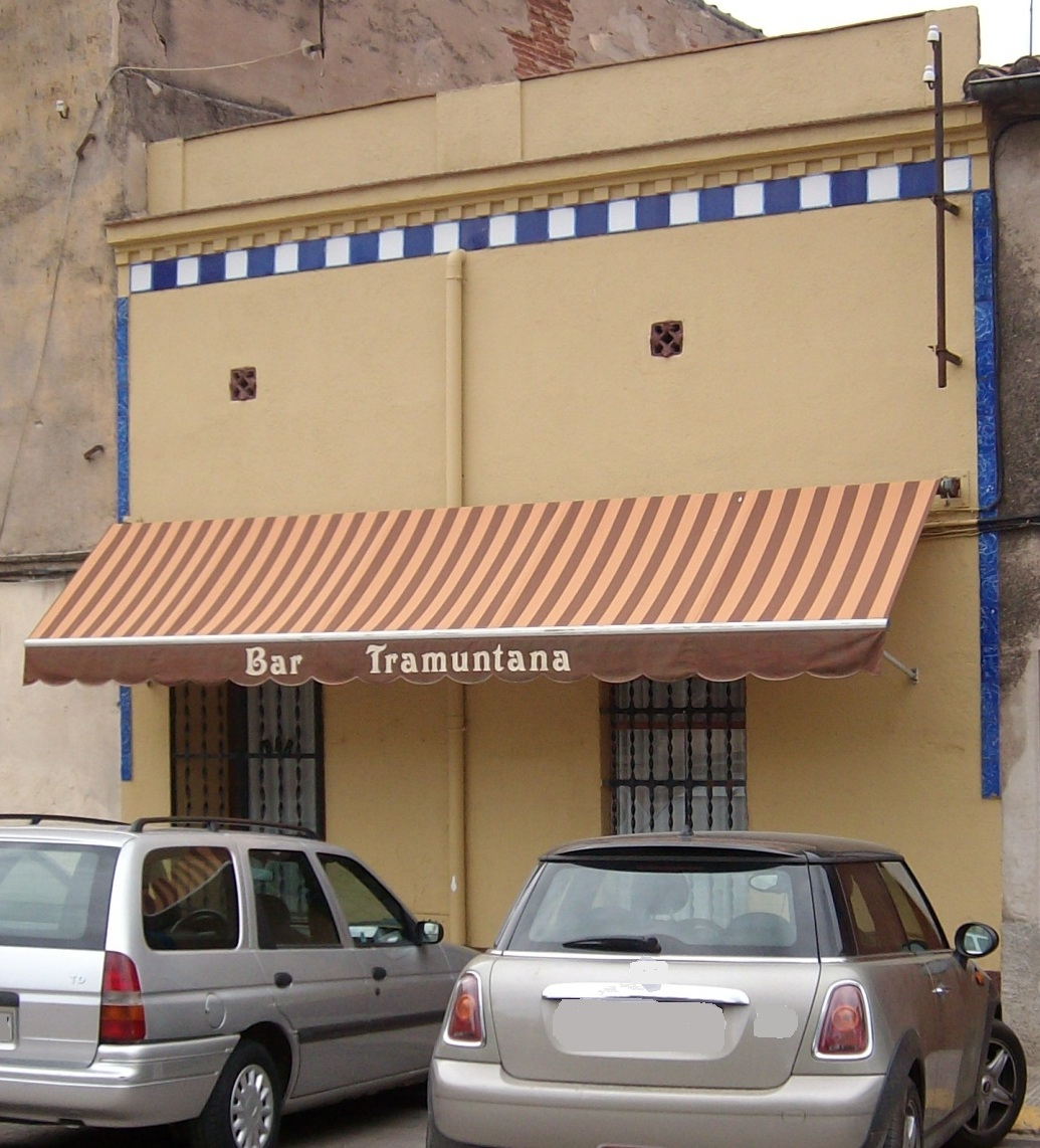 Bar Tramuntana, de la série de TV3, Ventdelplà